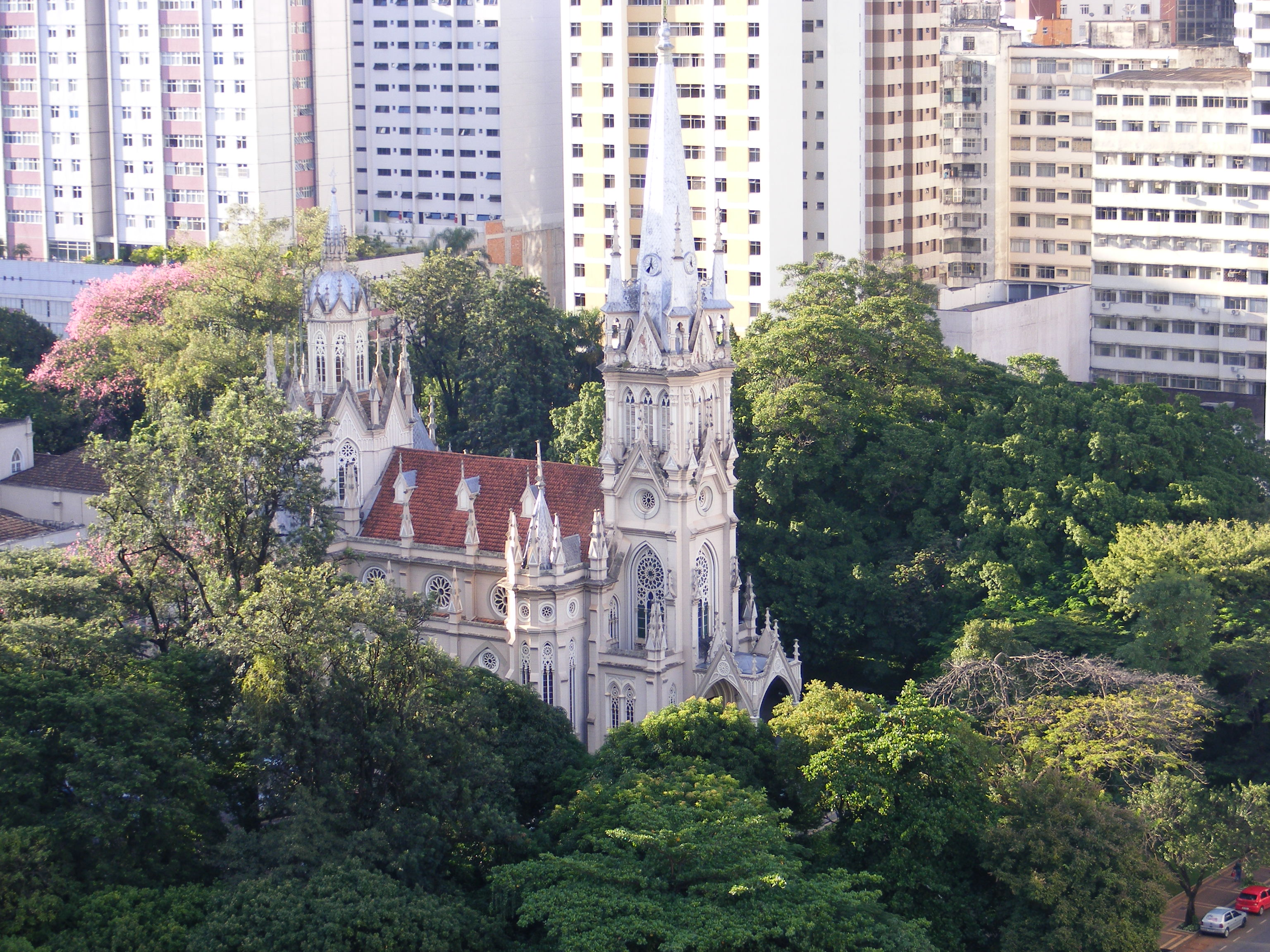 Catedral Nossa Senhora da Boa Viagem